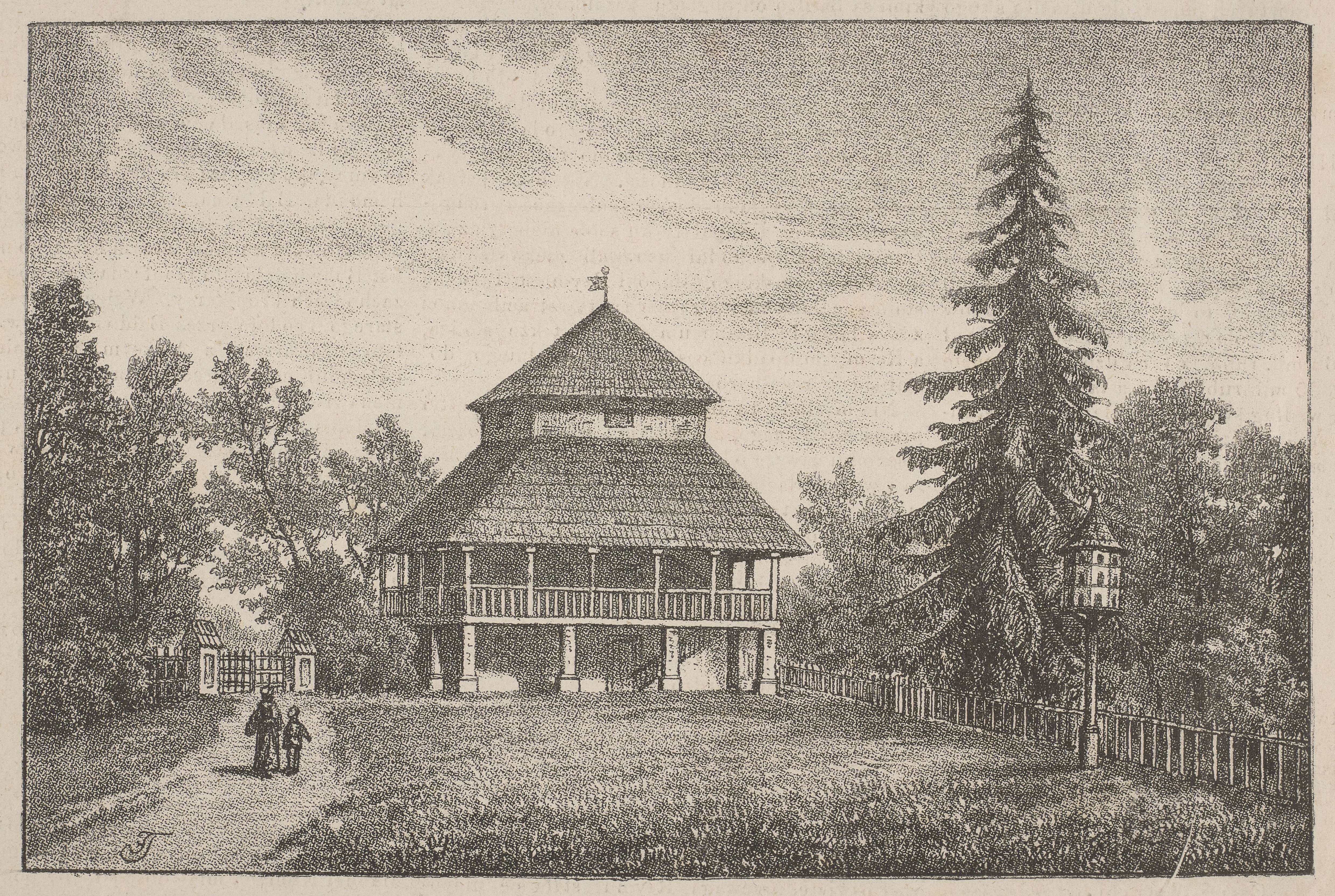 Беларуская (тарашкевіца): Сапоцкін (Sapockin). Лямус